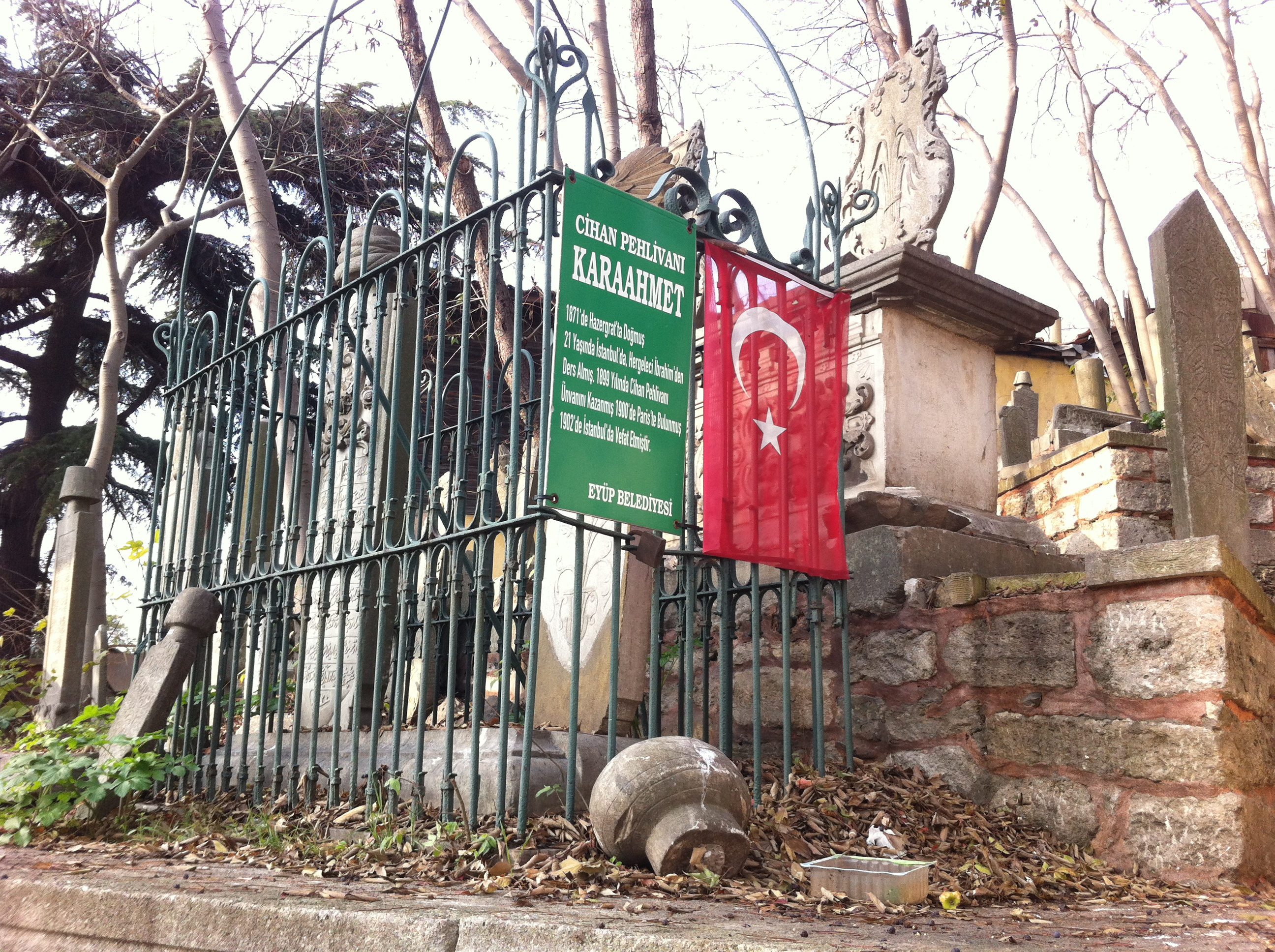 Cihan Pehlivanı Kara Ahmet